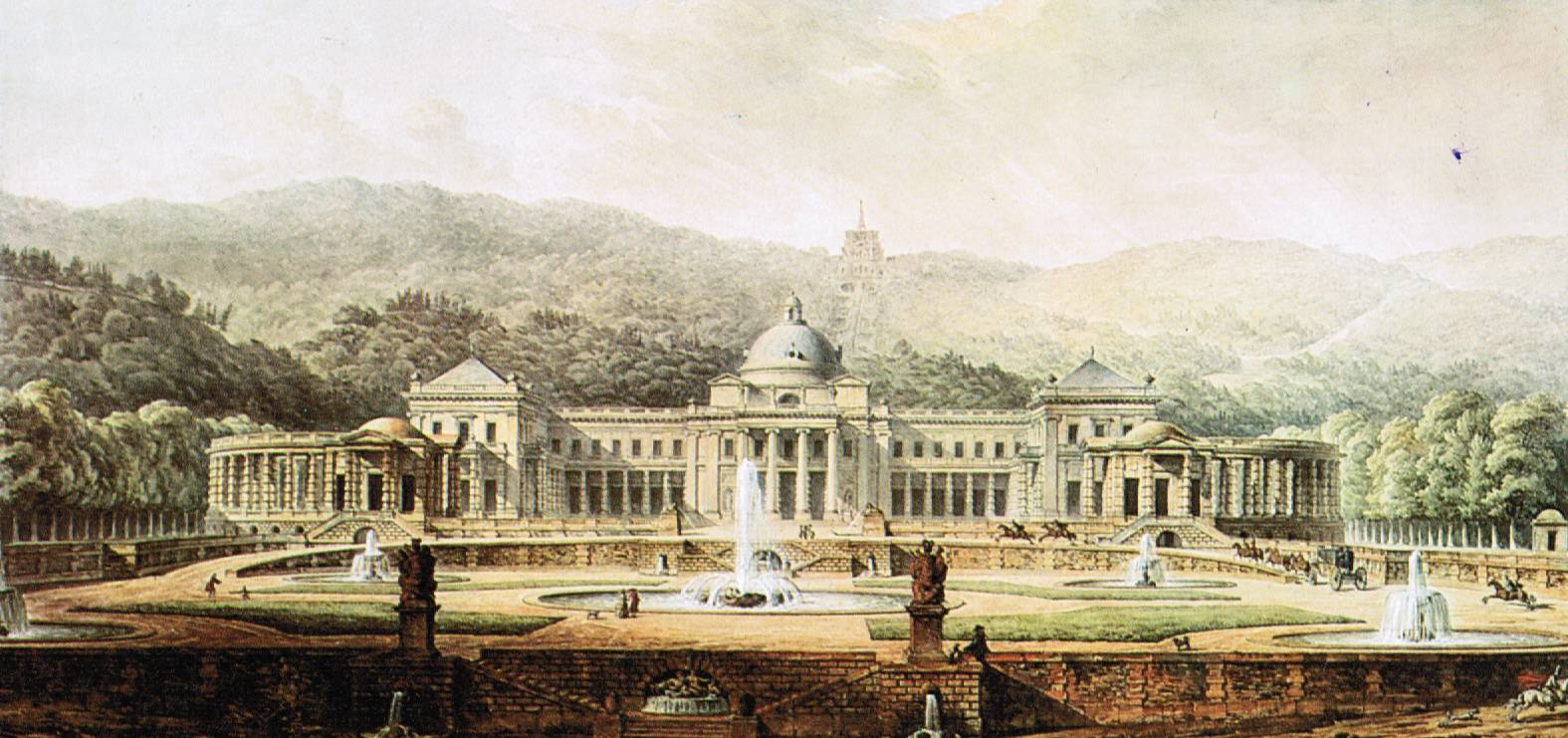 Werk von Charles De Wailly